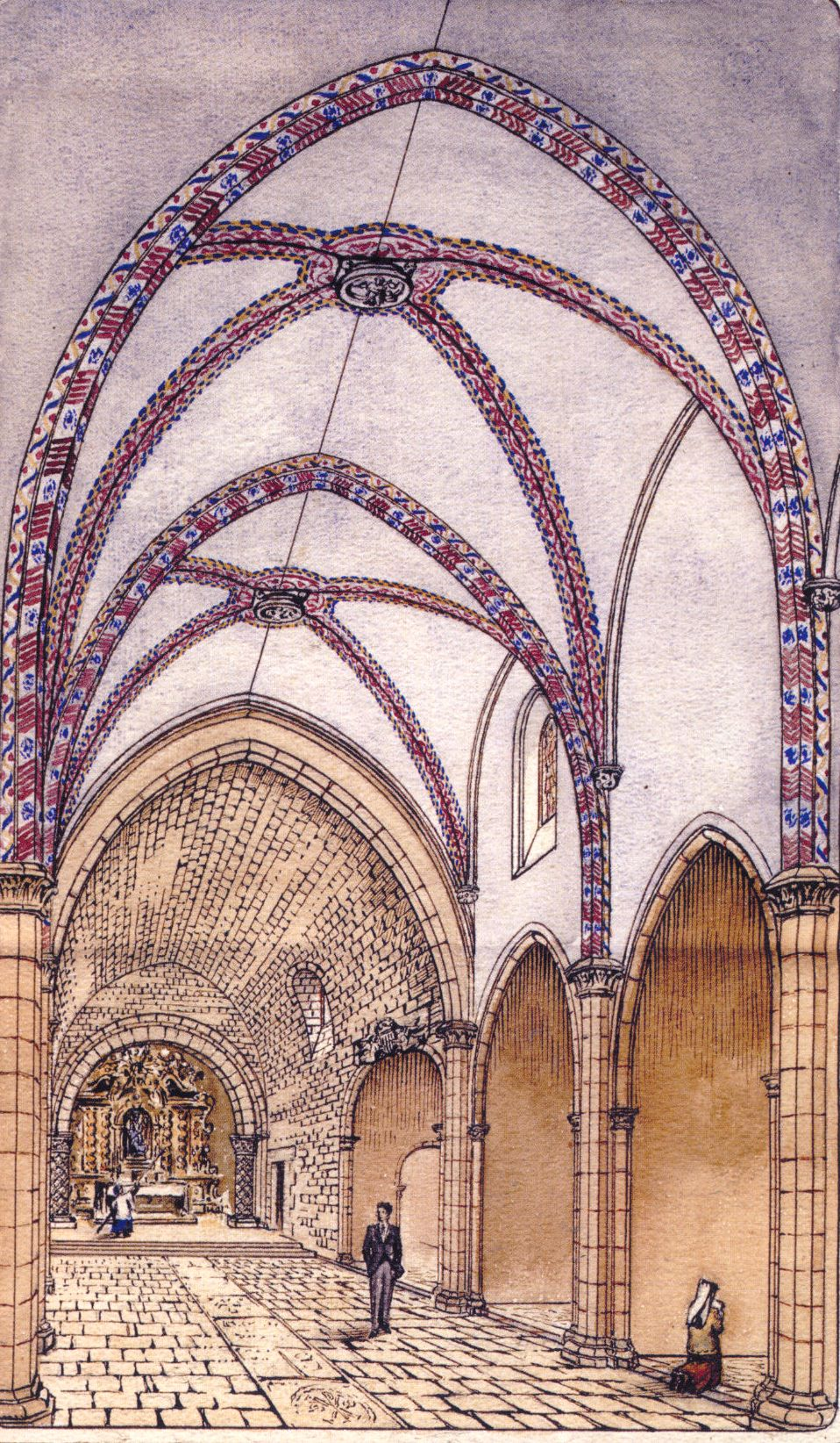 Restauració i reforma interior